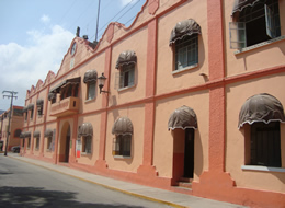 En esta imagen se muestra la presidencia municipal del municipio